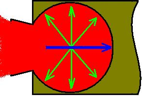 Nguồn : tự tạo